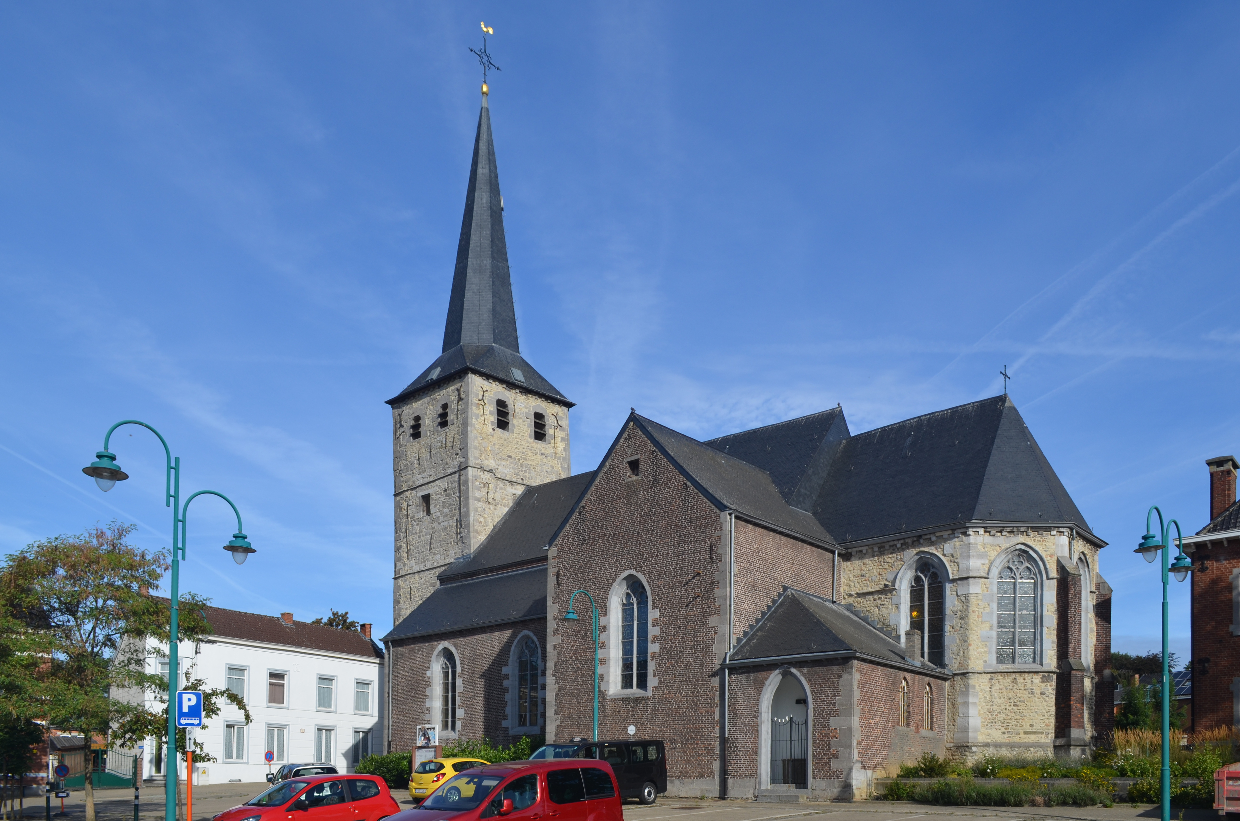 Mellet (Les Bons Villers-Belgique) - église des Saints-Martin-et-Mutien-Marie vue depuis la place et la rue Alphonse Helsen.